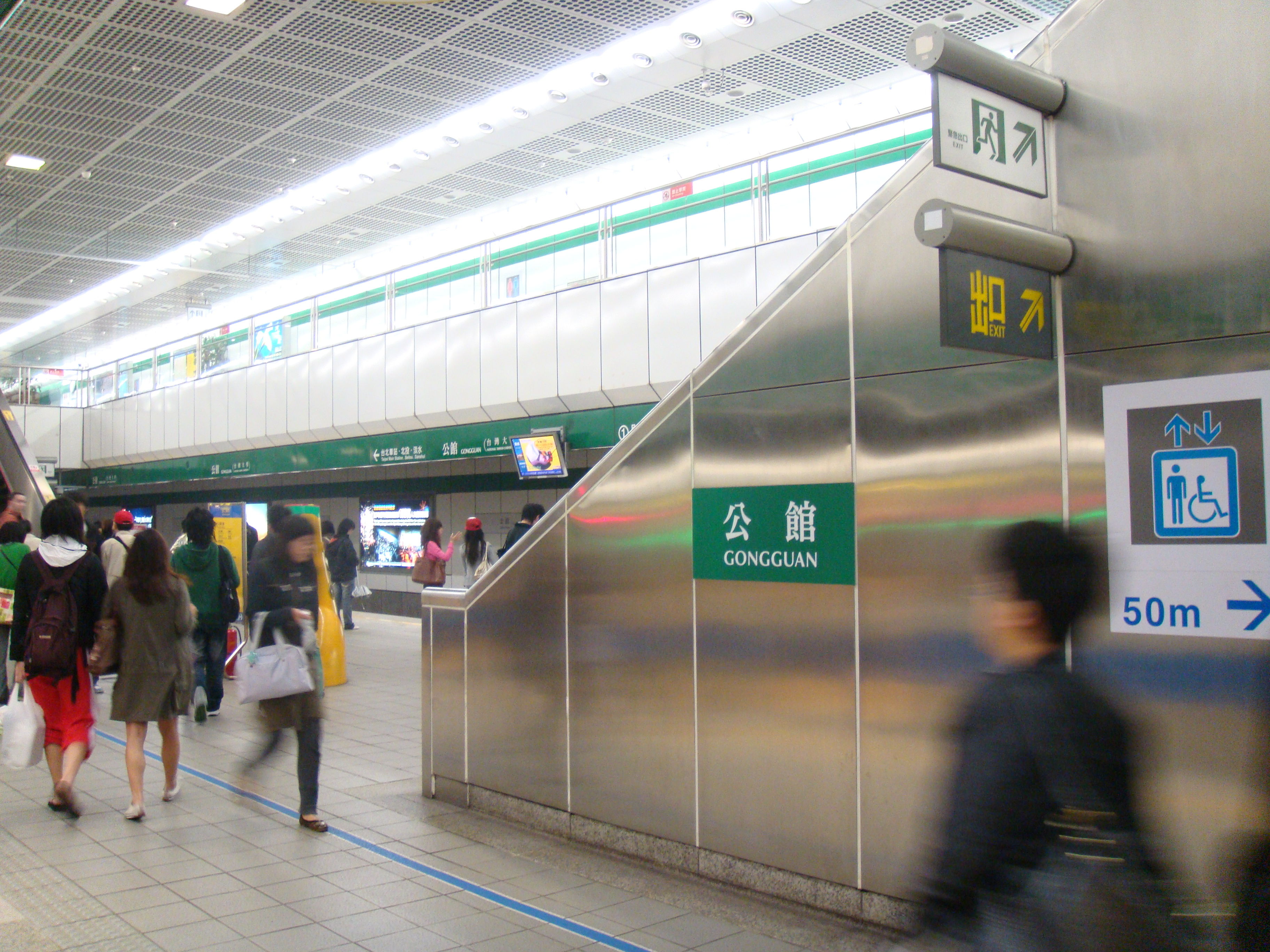 Gongguan Station, Xindian Line, Taipei Metro, Taiwan.